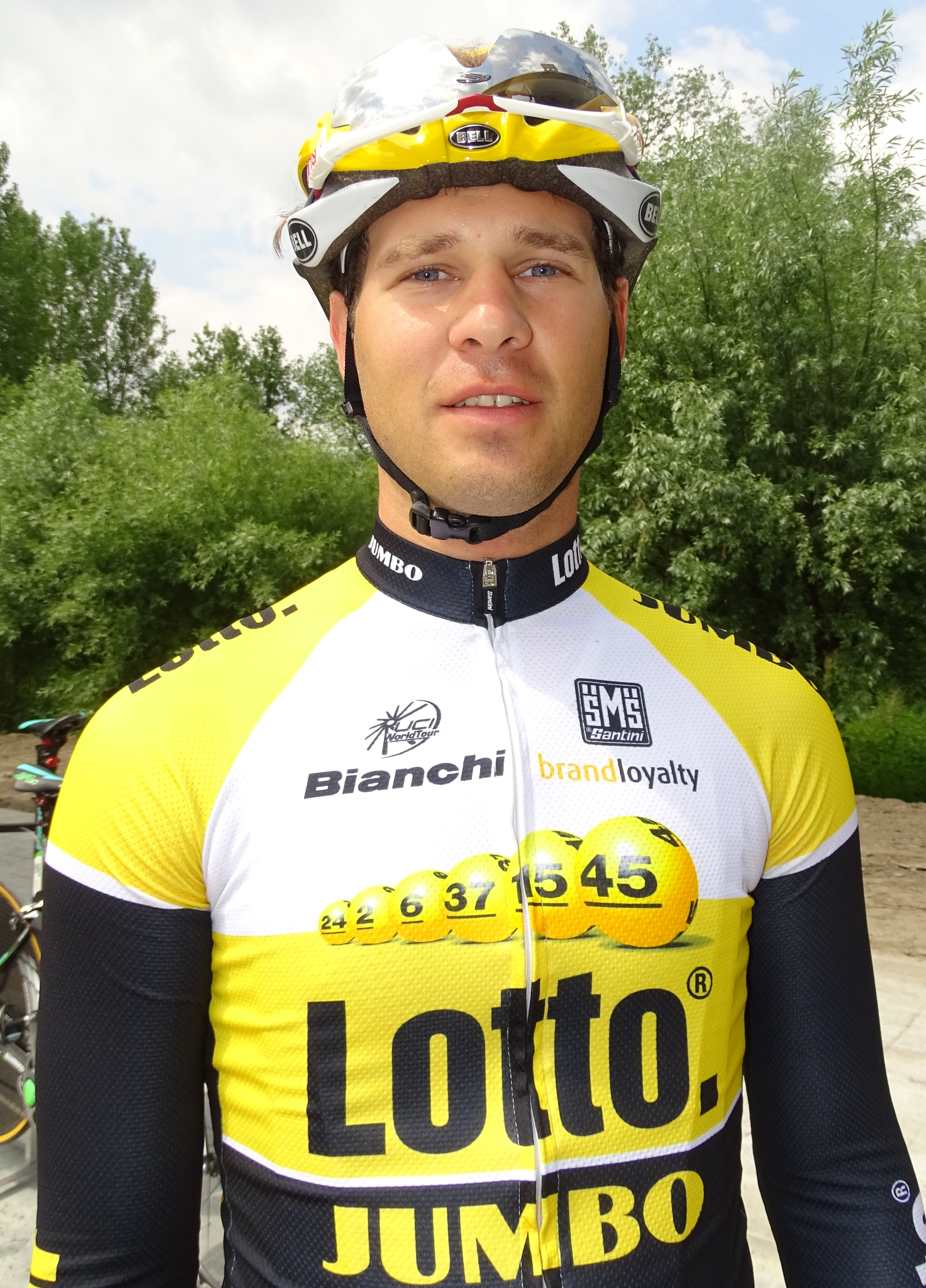 Reportage réalisé le mercredi 27 mai à l'occasion du prologue du Tour de Belgique 2015 à Bornem, Belgique.